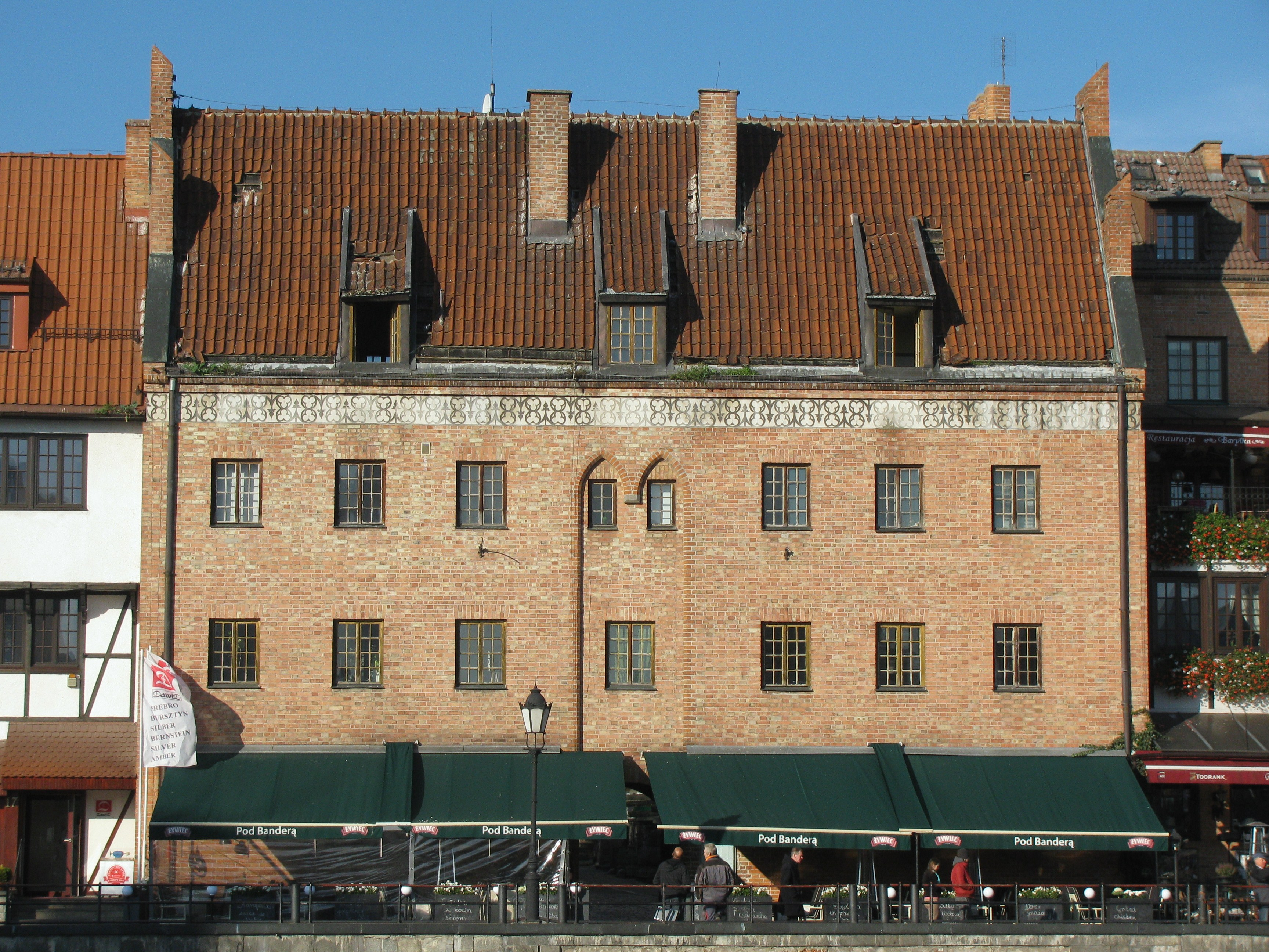 Gdańsk Główne Miasto, ul. Długie Pobrzeże 23 - Brama Świętego Ducha, XIV, XVII (strona zewnętrzna)